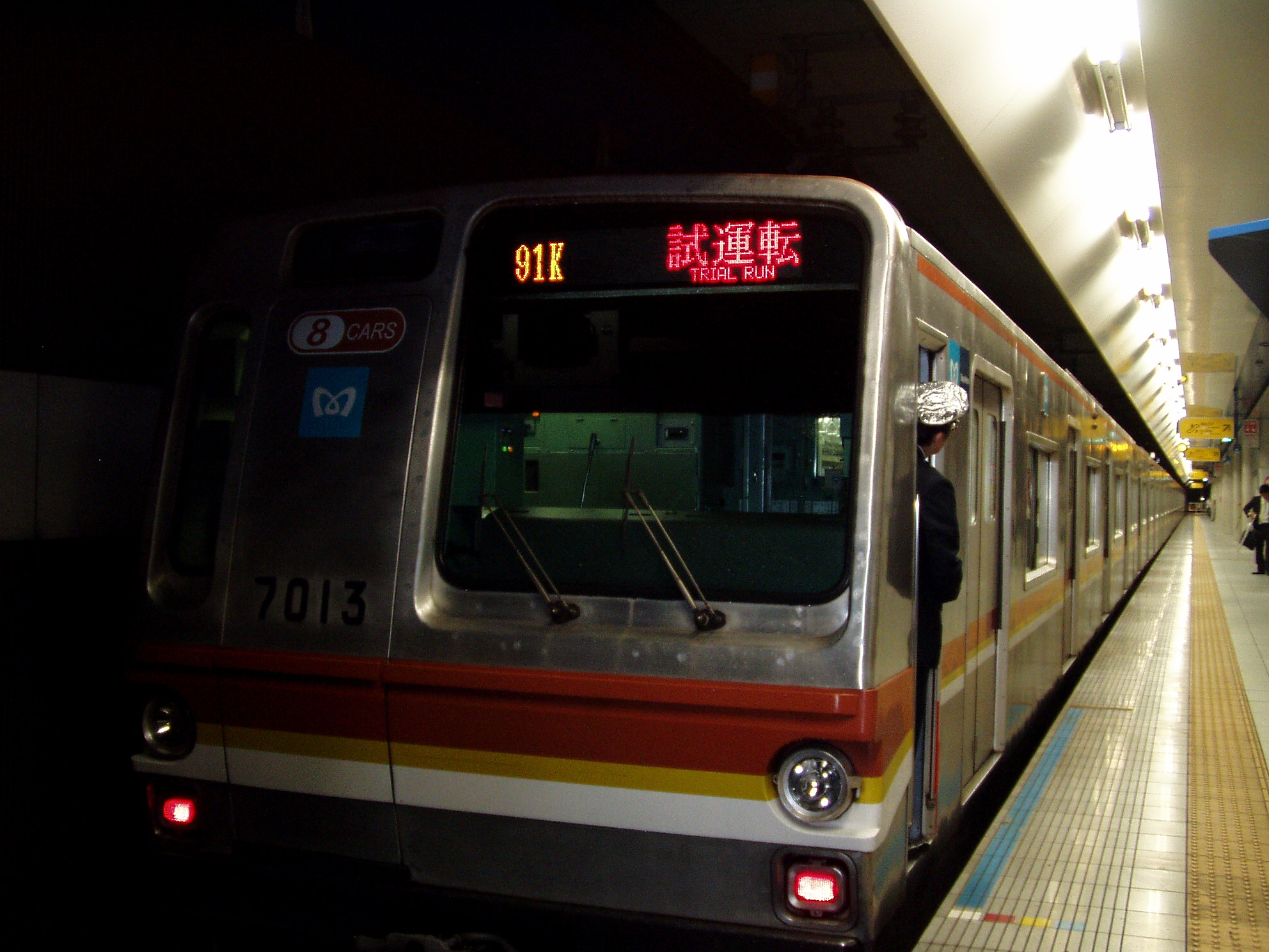 みなとみらい線で試運転を行っている様子です。